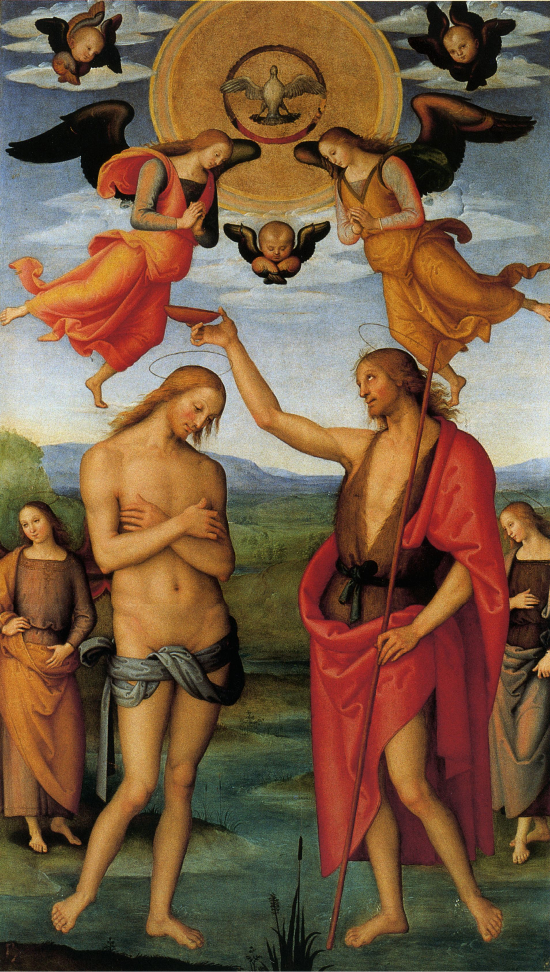 Pietro Perugino: Pala di Sant’Agostino (Battesimo di Cristo). Cat. no. 87 in Vittoria Garibaldi: Perugino. Catalogo completo. Octavo, Firenze 2000, ISBN 88-8030-091-1